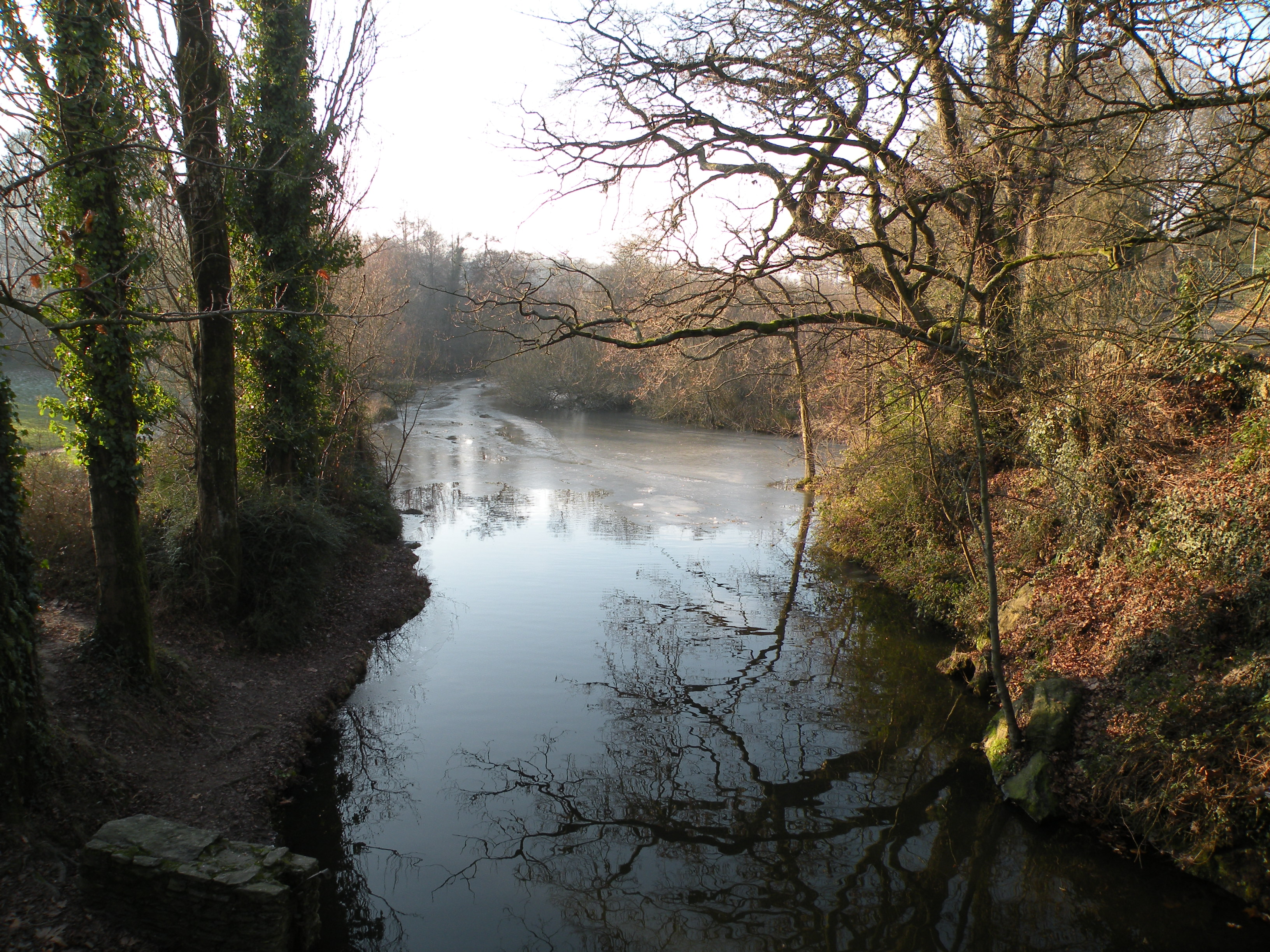 Le Gesvres pris par les glaces. La rivière marque ici la limite entre Nantes et La Chapelle-sur-Erdre